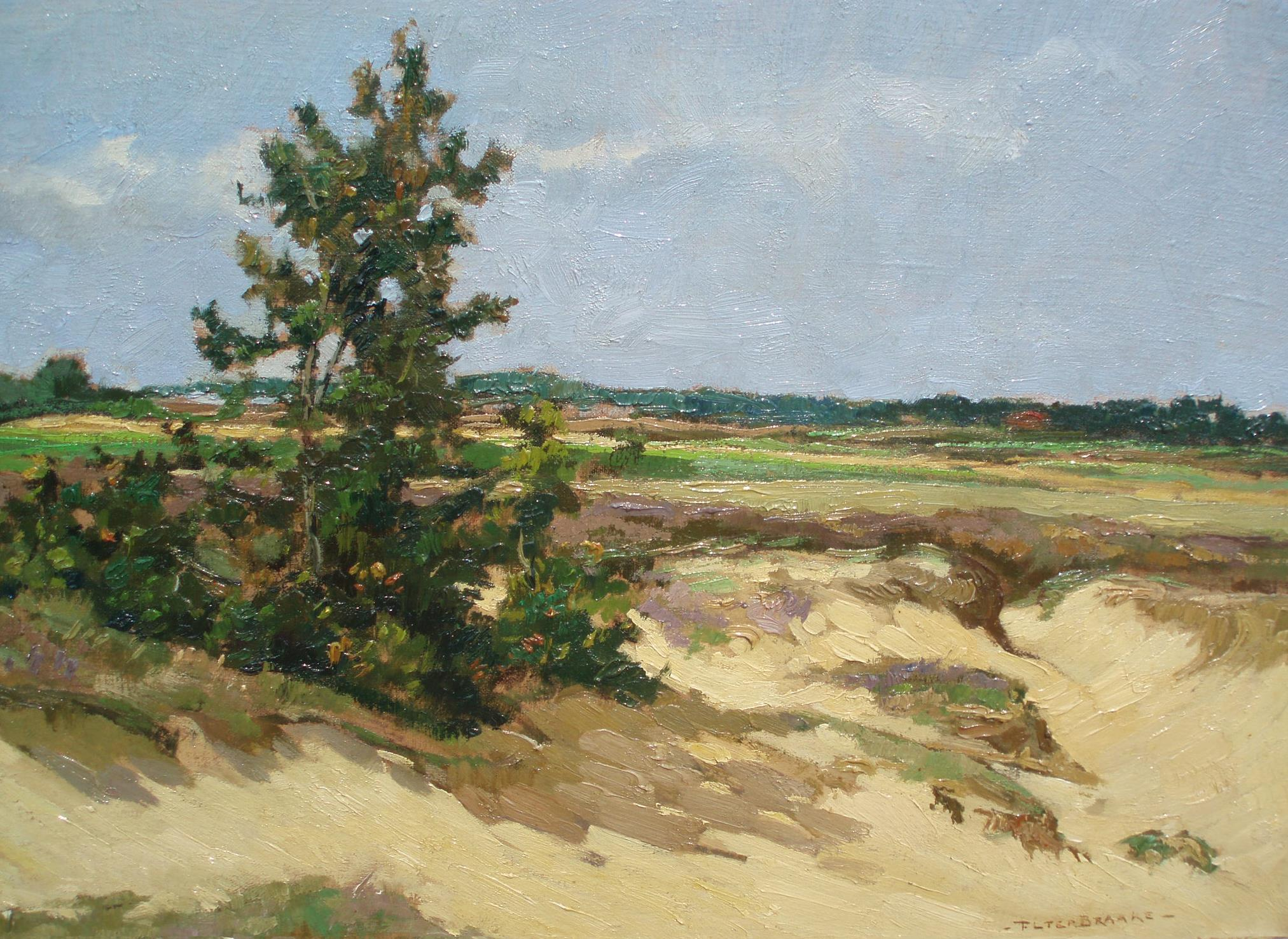 Dunes in the Netherlands